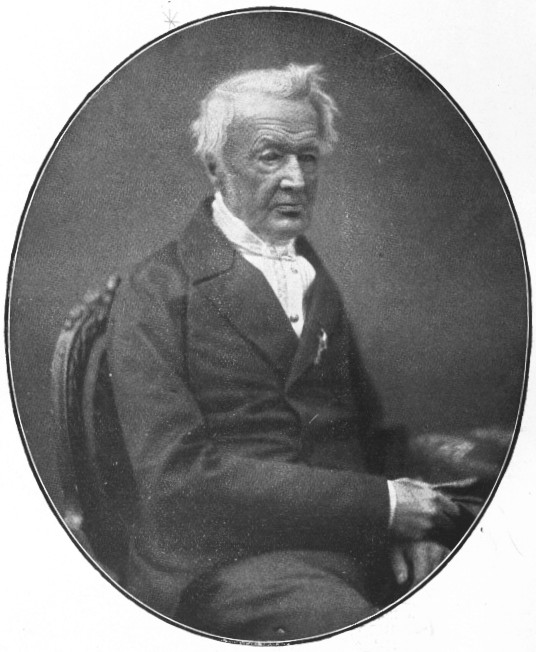 Detlev von Einsiedel, Altersbildnis